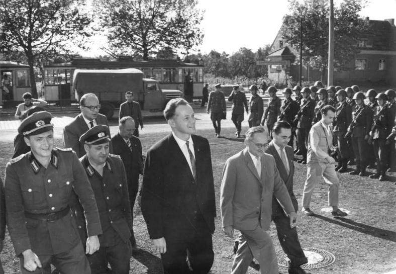 ADN-ZB-Krisch-29.8.1961-Berlin: Mitglieder des Parteivorstandes der LDPD besuchen eine Einheit der Bereitschaftspolizei, die zur Durchsetzung der Grenzsicherungsmaßnahmen vom 13.8.1961 eingesetzt ist. Bei ihrem Eintreffen wurden sie von einem Ehrenzug der Bereitschaftspolizei begrüßt. V.l.n.r.: Manfred Gerlach, Generalsekretär der LDPD, Max Suhrbier, Vorsitzender der LDPD, Rudolf Agsten, Vorsitzender der LDPD-Volkskammerfraktion. Veröffentlichung nur mit Genehmigung der Pressestelle des MDI